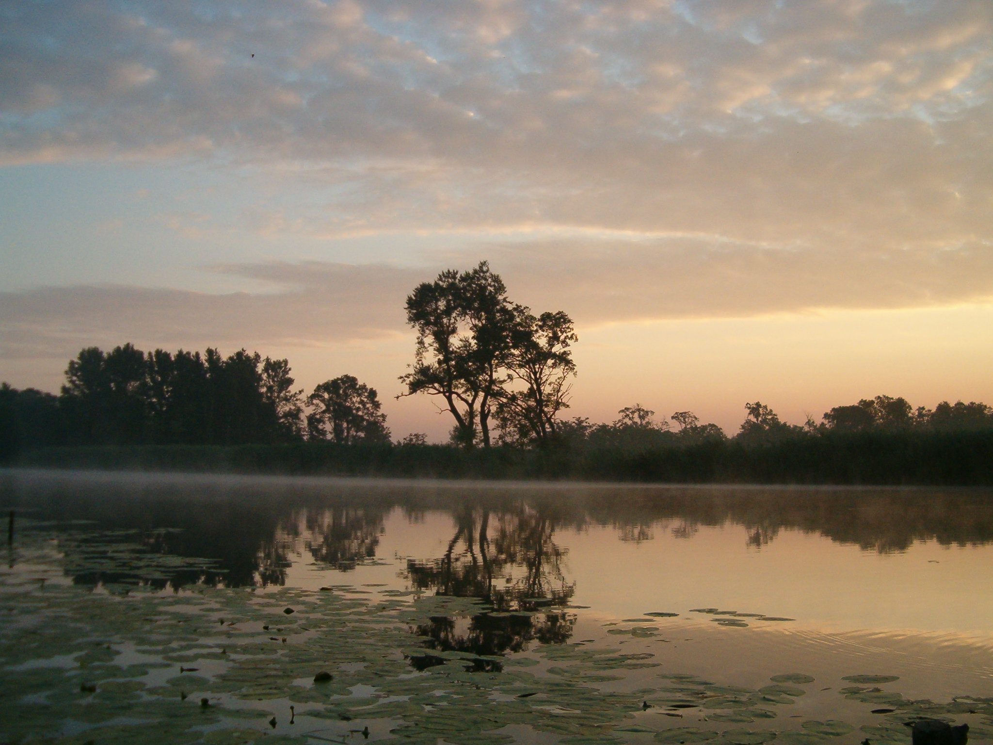 Hajnali csendélet Küllődön, a Bajai-csatornán (Szerbia)